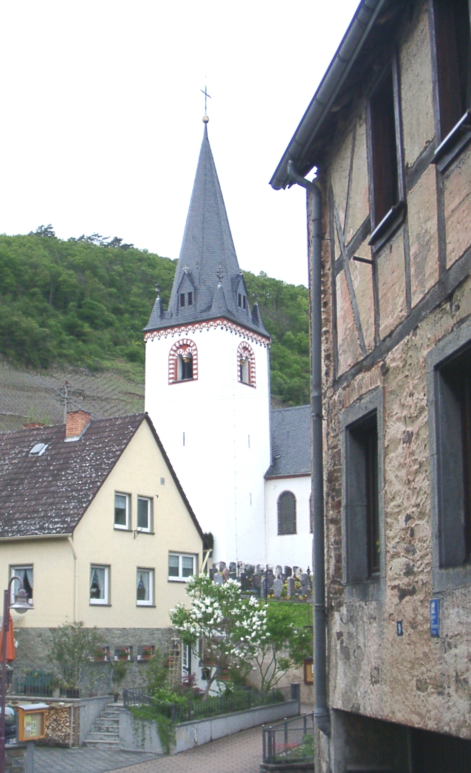 Sujet:Kierch zu Löf Source:Eege Foto vum Klaus Graf